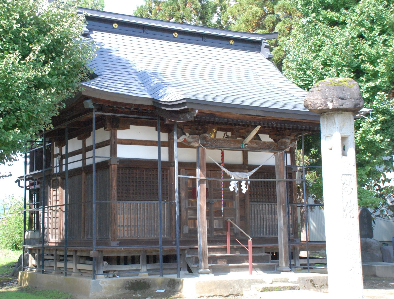 山形県東村山郡中山町達磨寺の八幡神社。2015年10月撮影。